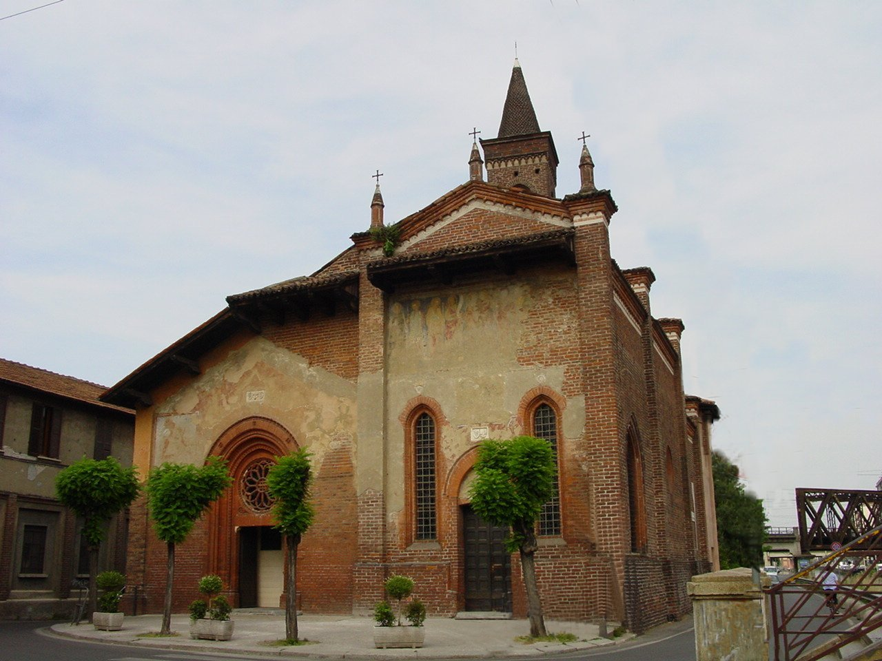 Facciata della Chiesa di San Cristoforo in Milano - Italia